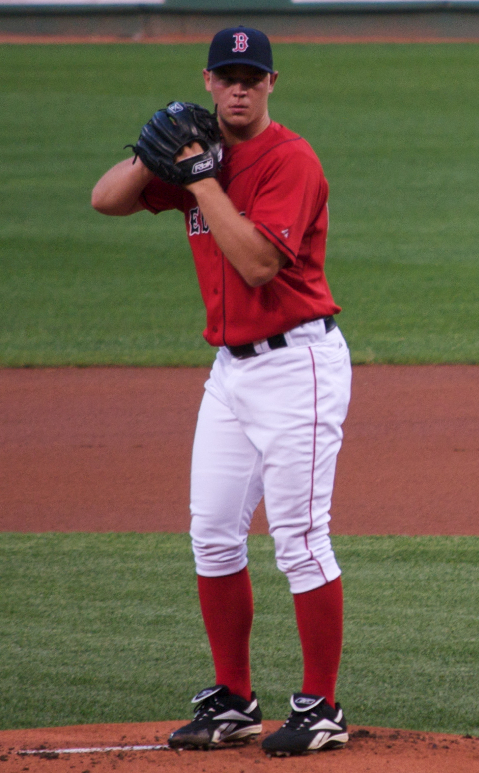 Michael Bowden